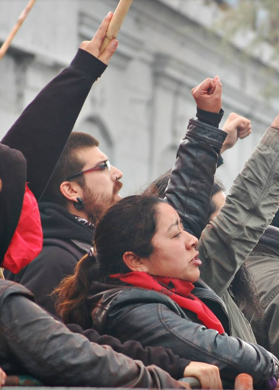 Camilo Torres, Presidente Fepucv 2014